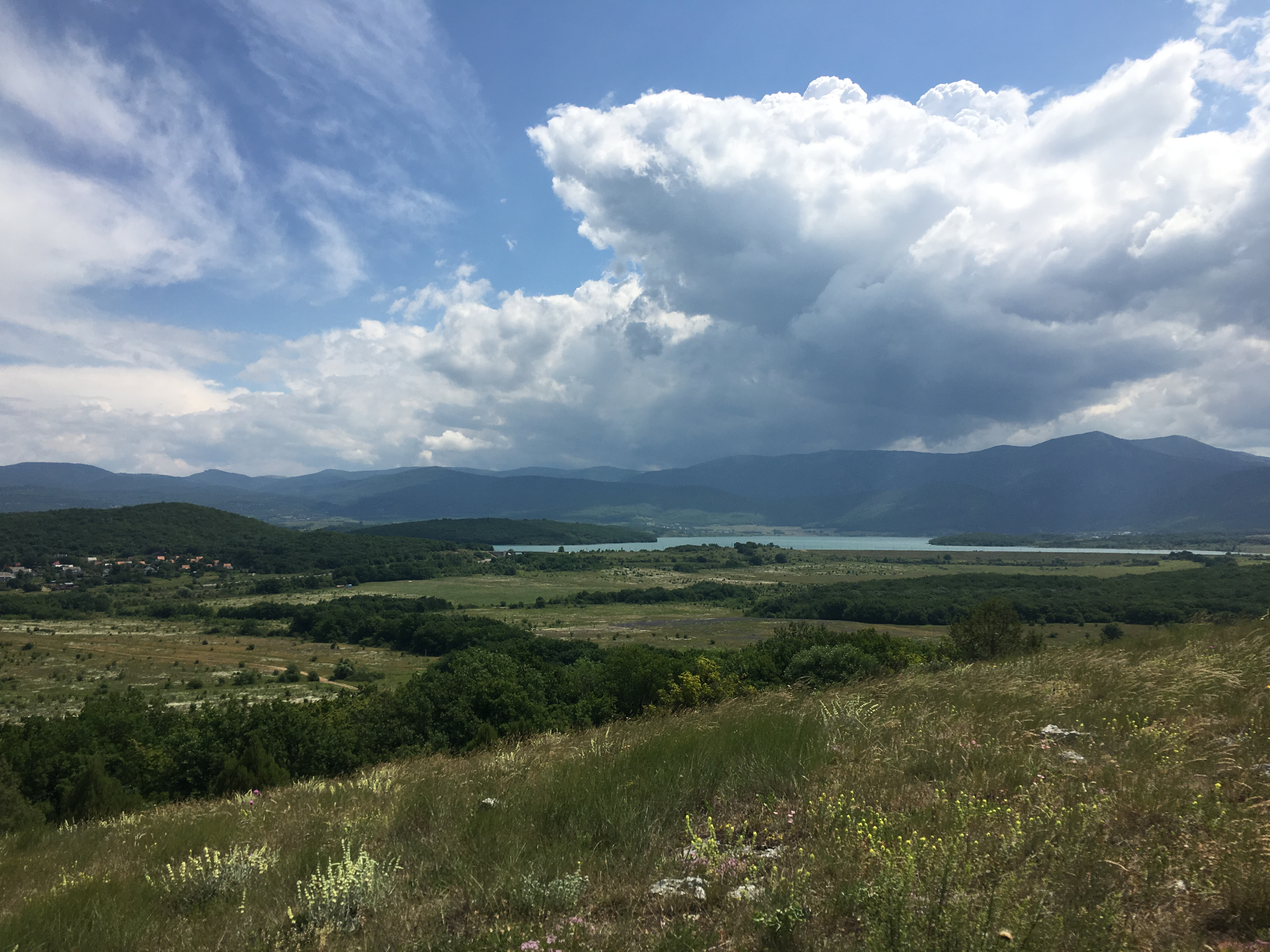 Байдарский заказник: Большая часть заказника находится на территории Севастополя. В Республике Крым находится небольшая часть в горной части Бахчисарайского района (например, каньон Узунджи)., Бахчисарайский район, Крым This object is located on the Crimean Peninsula and recognized as a protected area by both Russia and Ukraine under the ID: 8200018 / 85-363-5001, respectively. The legal status of the Crimean region is currently disputed.